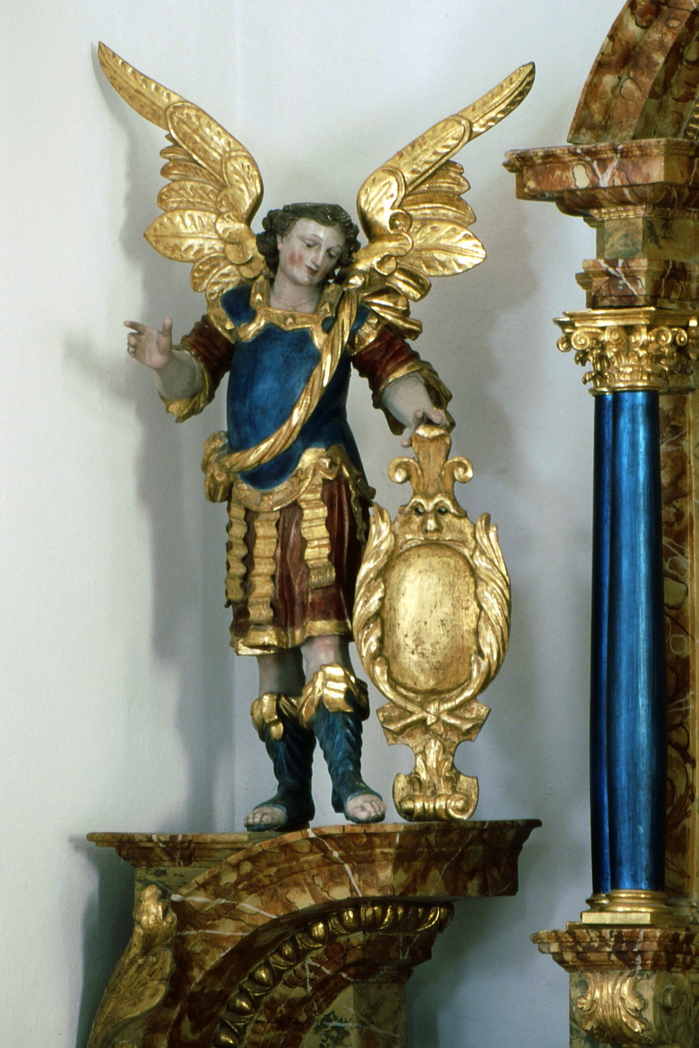 Engel von Nikolaus Babel an einem Seitenalar der Kirche in Vils